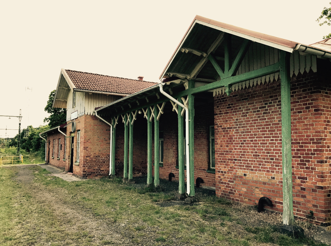 Fåglaviks Stationshus